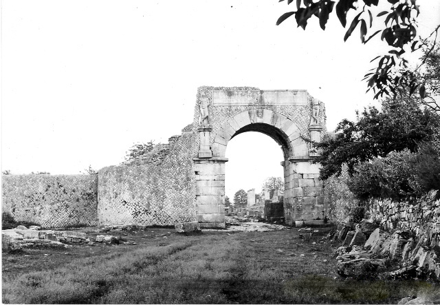 Area archeologica di Saepinum ad Altilia, frazione di Sepino (CB): veduta esterna di Porta Bojano.